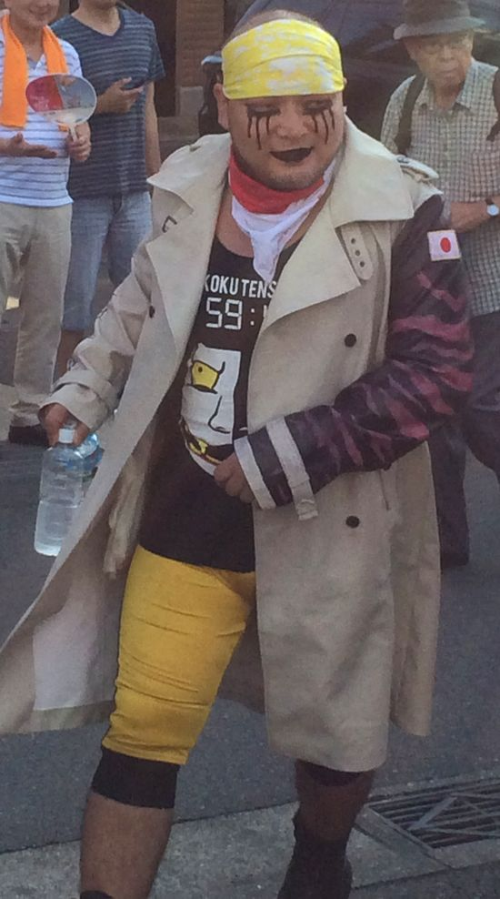 小机商店街